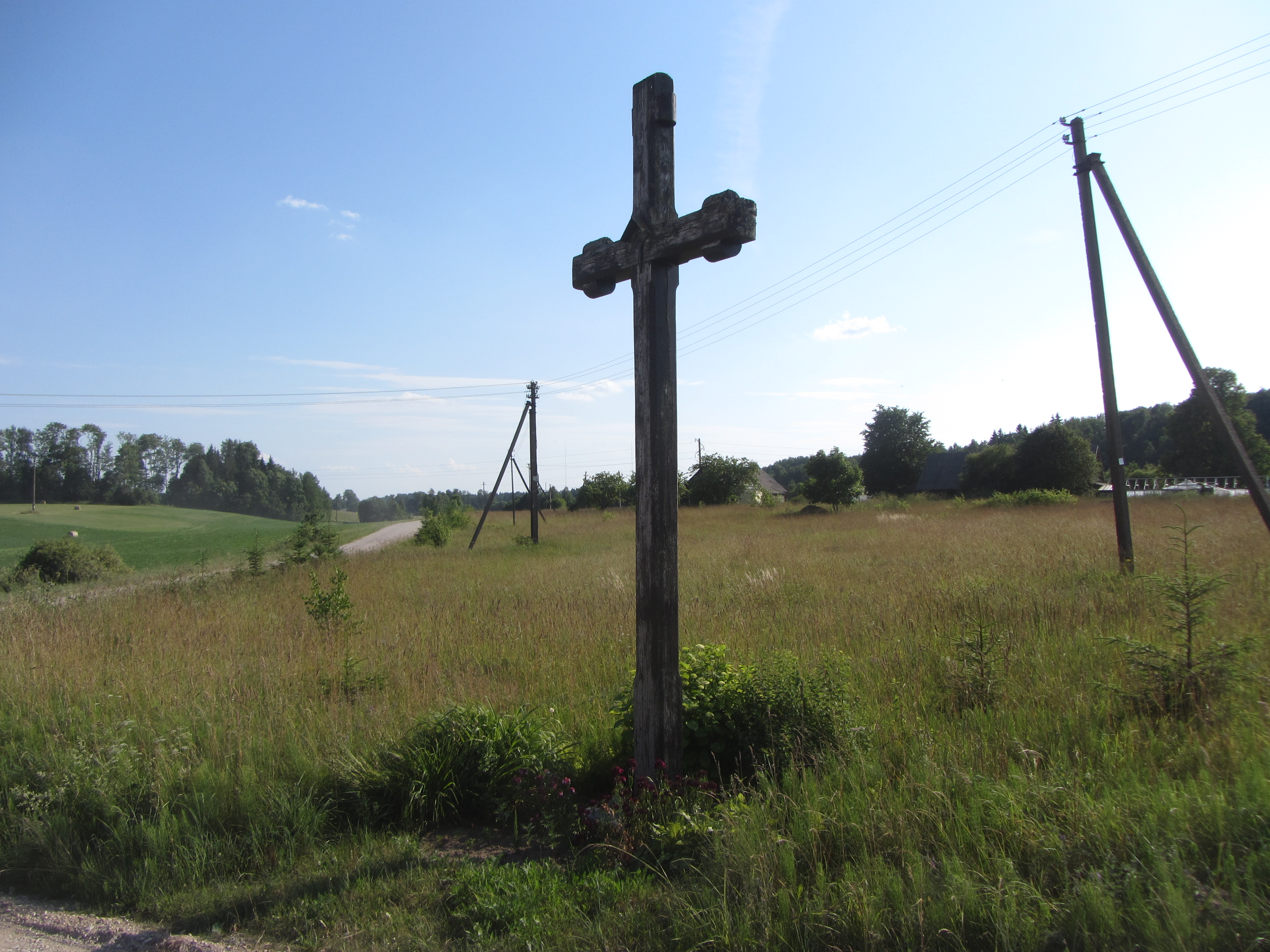 Kurkleliai 29220, Lithuania